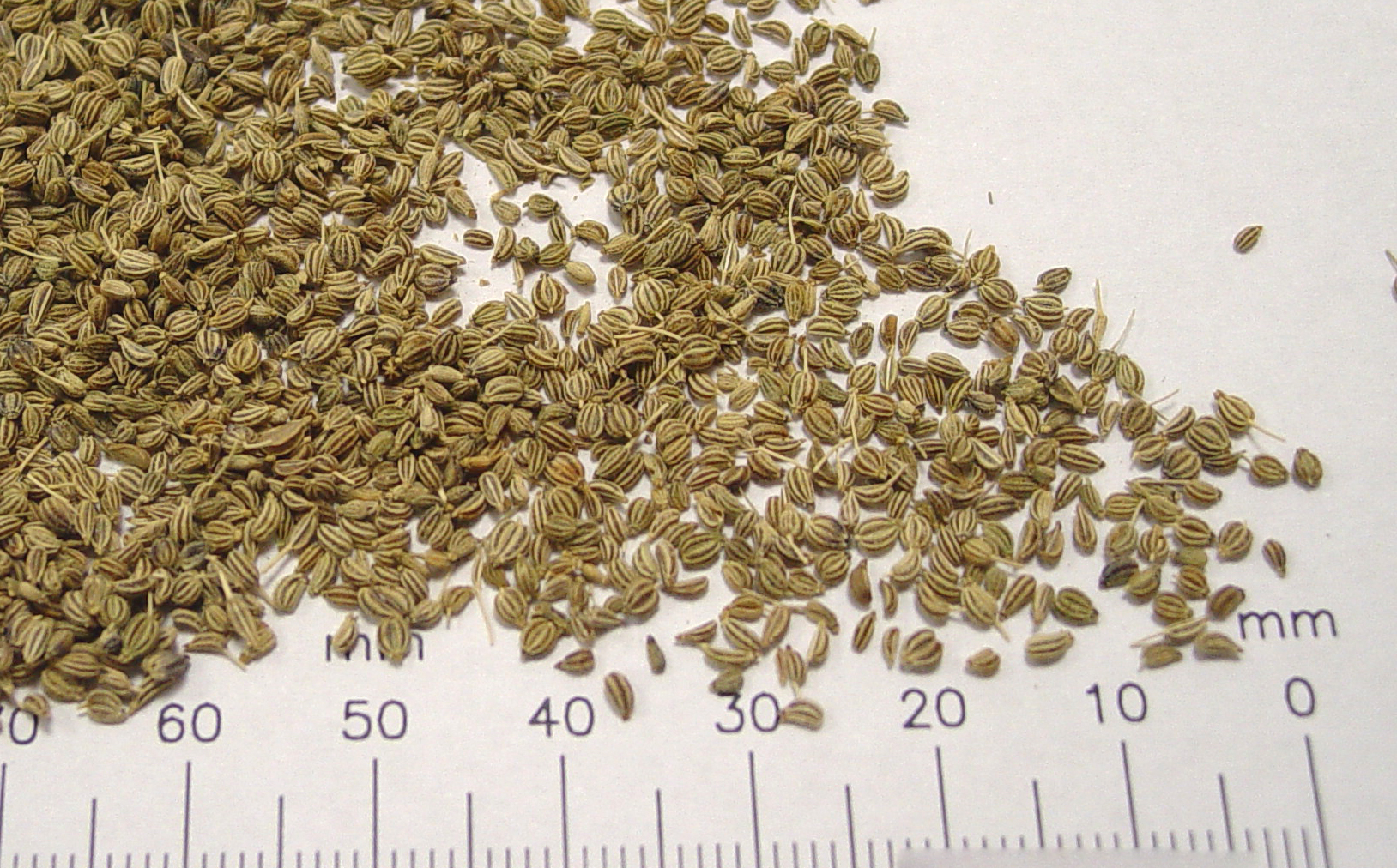 അയമോദകം -Ajwan എന്നു ആംഗലേയത്തിലും, अजवायन, अजवान എന്നു ഹിന്ദിയിലും यवनक, यवानी എന്നു സംസ്കൃതത്തിലും ஓமம் (ഓമം) തമിഴിലും പറയുന്നു.